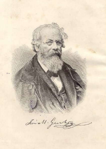 Grabado que muestra a José Manuel Groot y su firma.